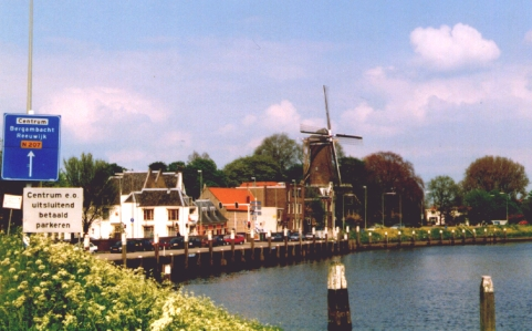 Gouda, Hollandse IJssel thv IJsselkade - foto privé (met toestemming geplaatst)